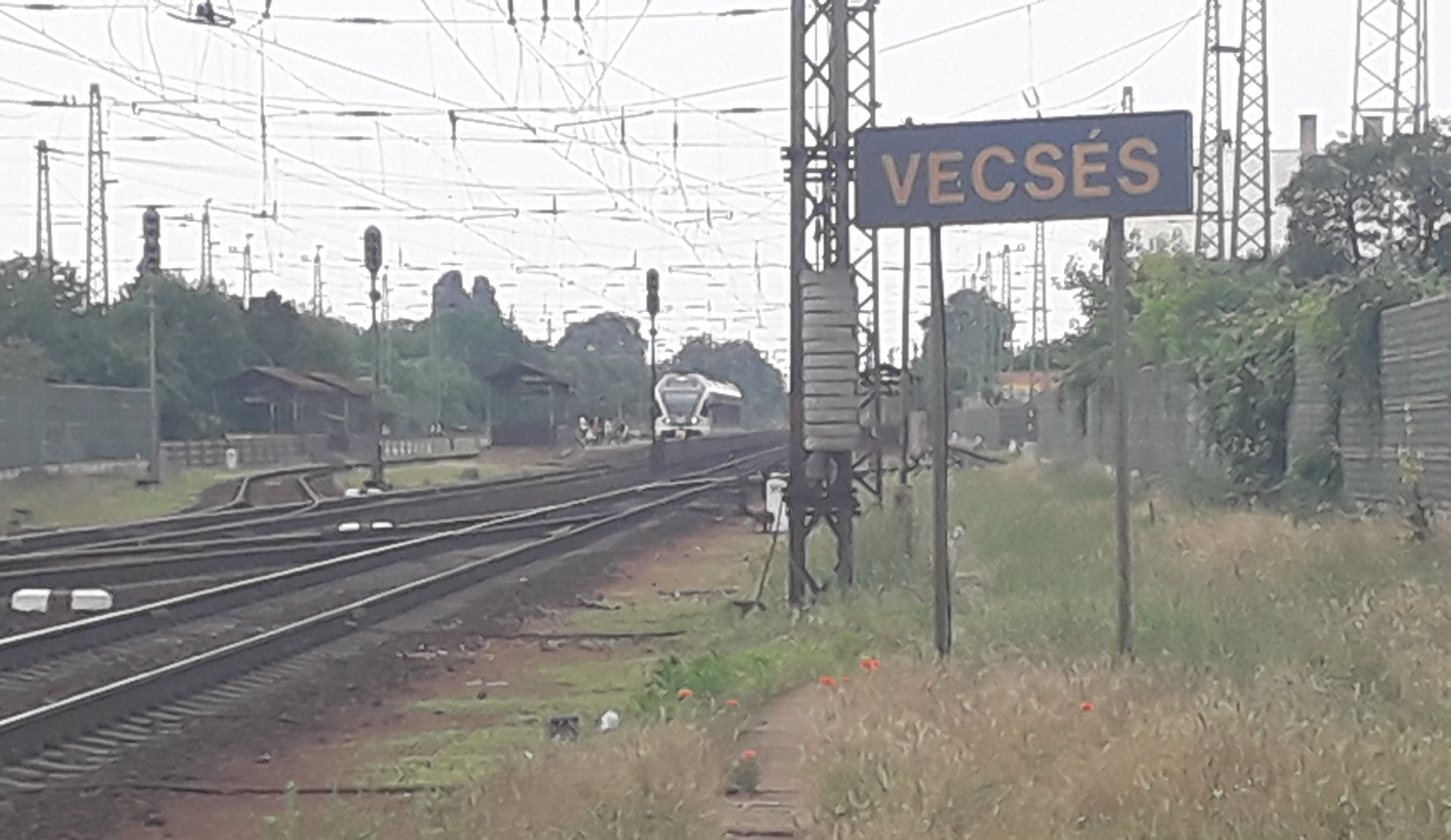 Vecsés állomás